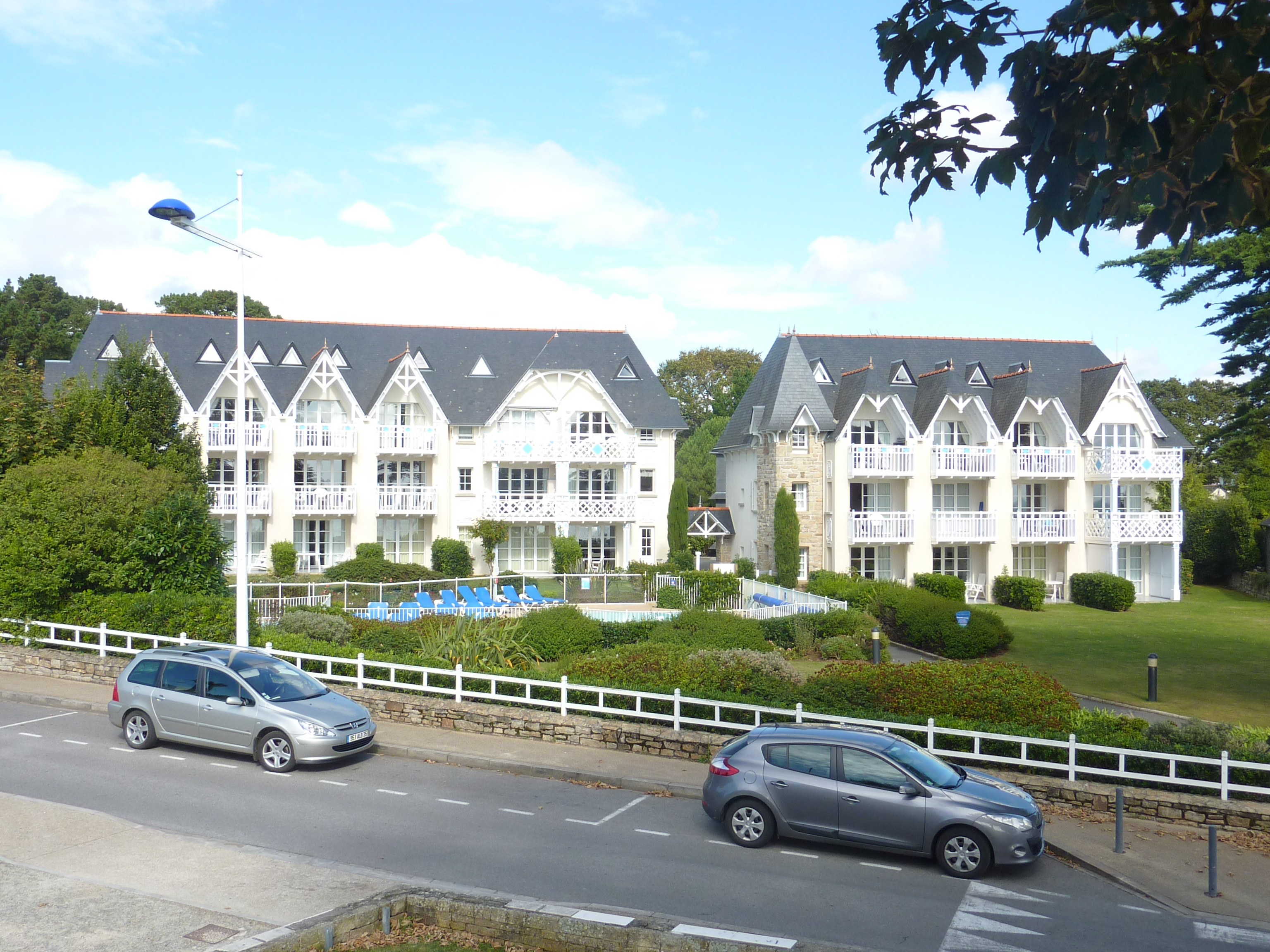 Bénodet : la résidence "Pierre et Vacances"